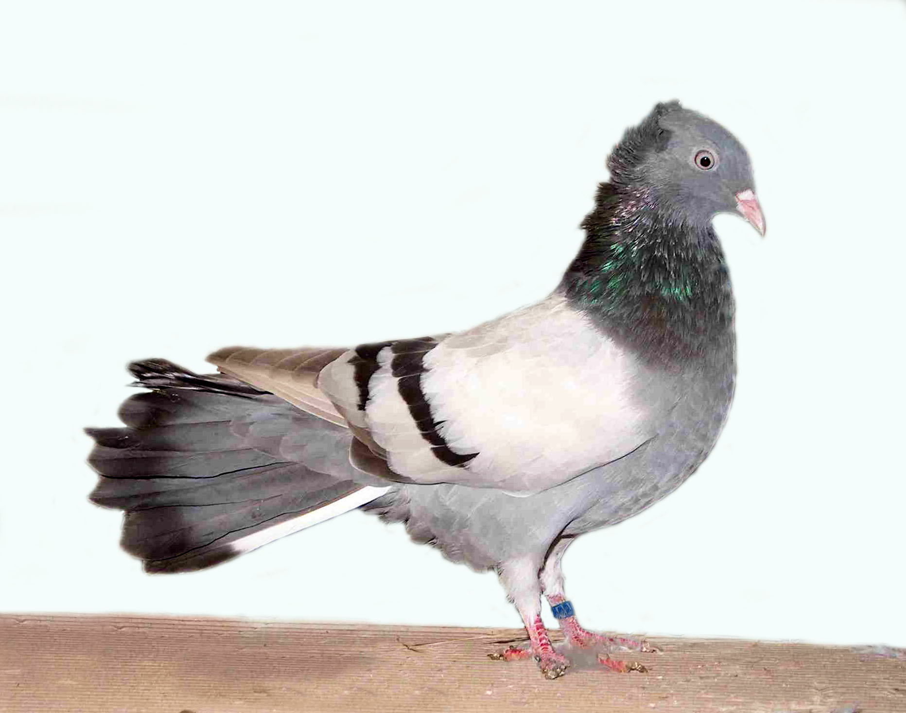 Danzig Highflier (Silver Barred)